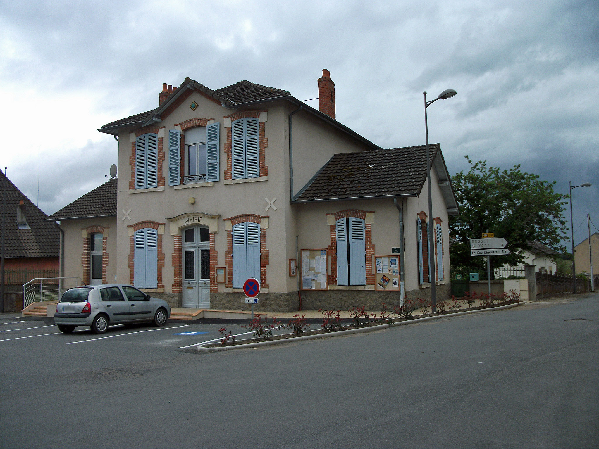 Mairie de Molles